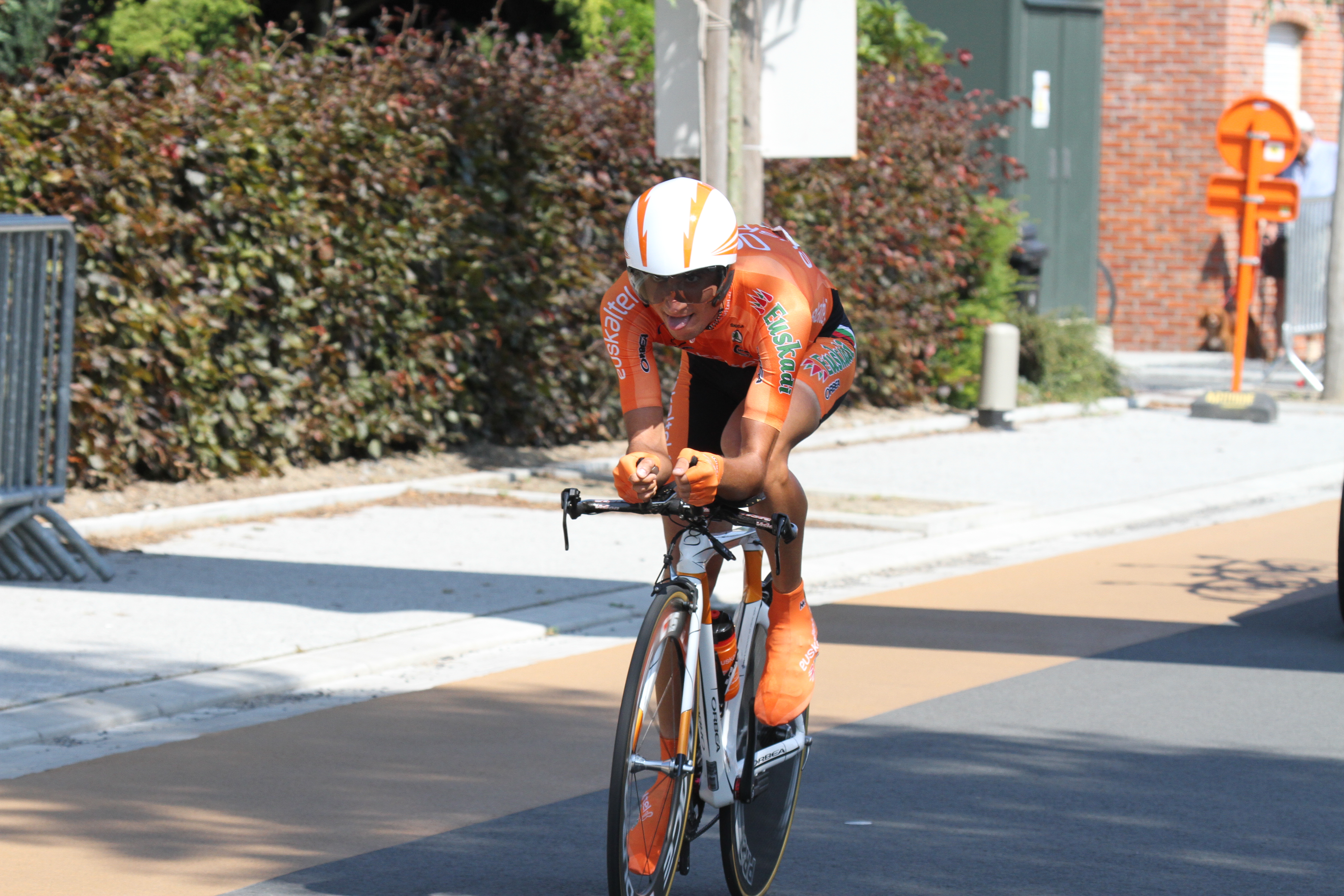 Víctor Cabedo tijdens de Eneco Tour 2012. Rit 6: tijdrit Ardooie-Ardooie 17,4km.